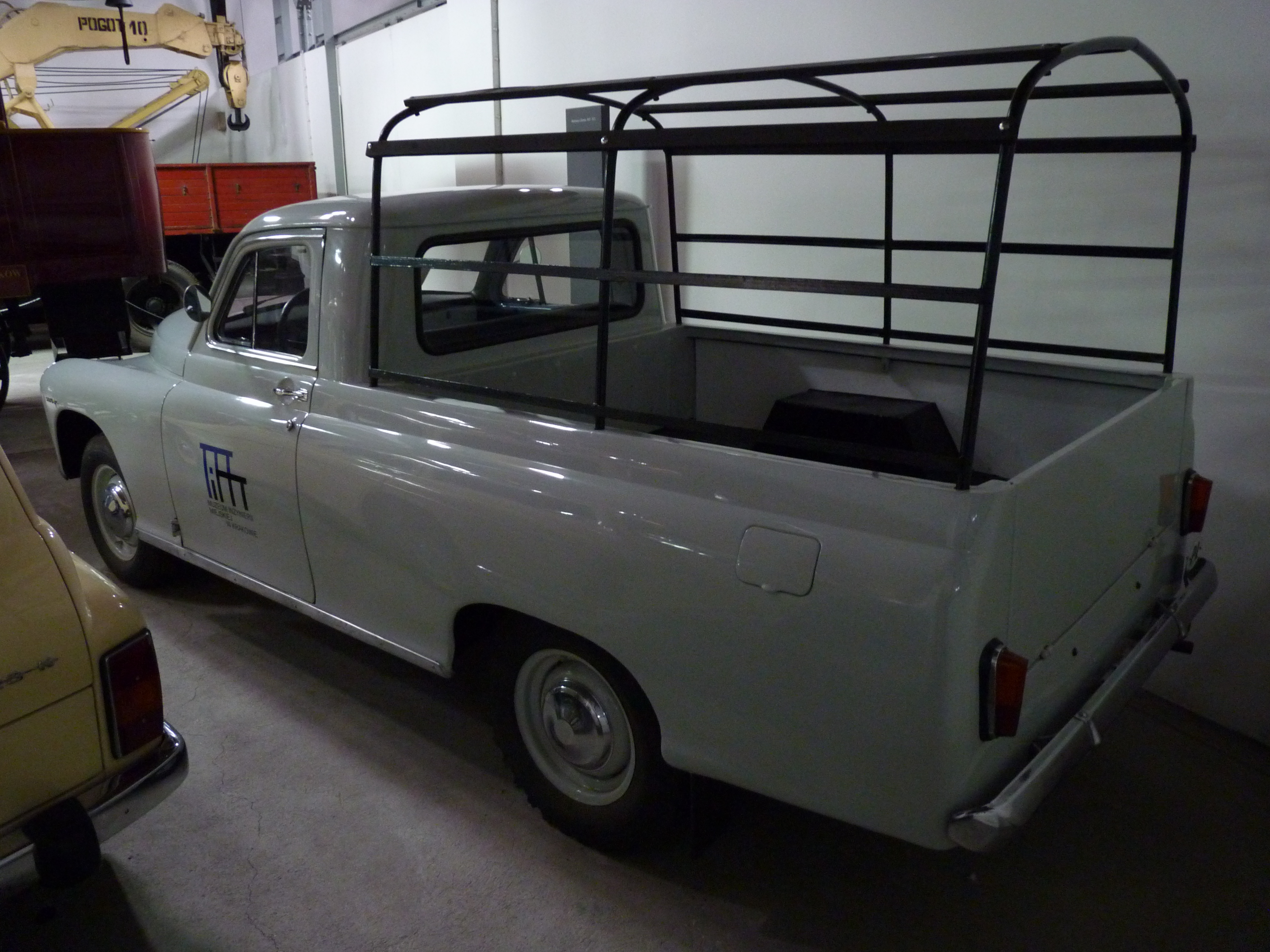 FSO Warszawa 204 P at Muzeum Inżynierii Miejskiej in Kraków.